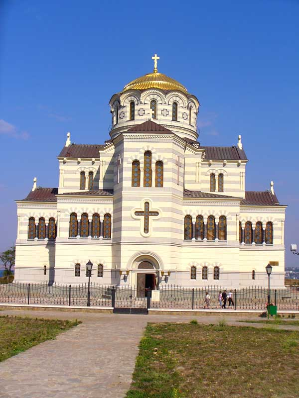 Владимирский собор в Херсонесе